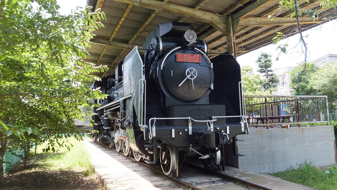 香川県高松市番町二丁目公園の国鉄C58形蒸気機関車（12号機）